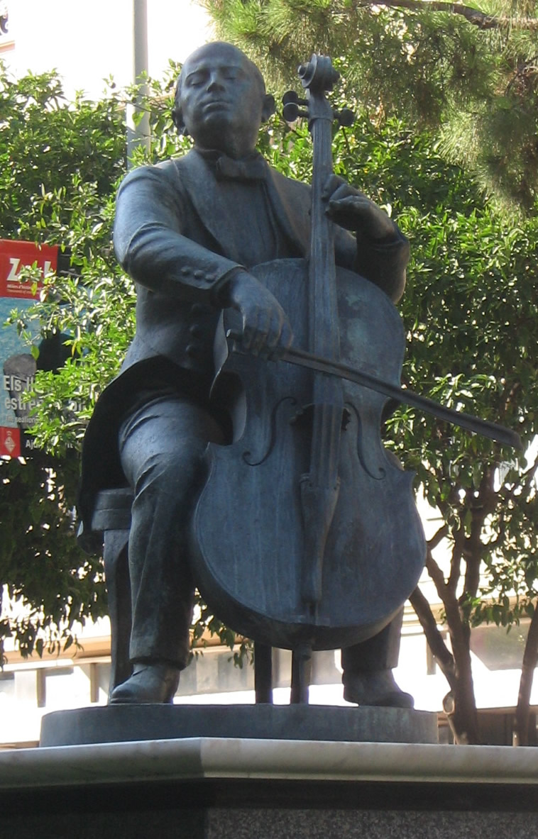 Monumento a Pau Casals en Barcelona, en la avenida que lleva su nombre.